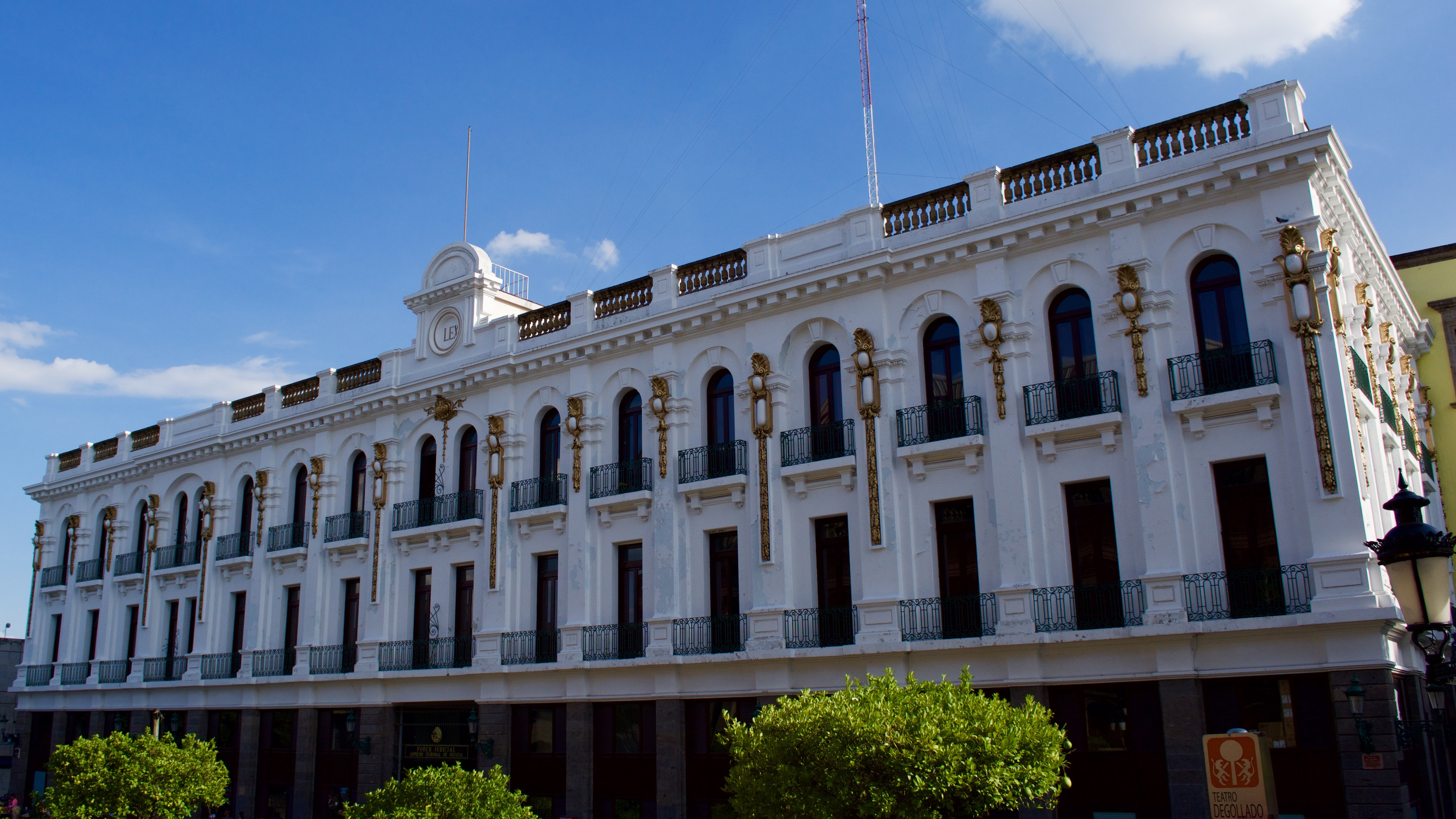 Actualmente los juzgados se trasladaron a Ciudad Judicial